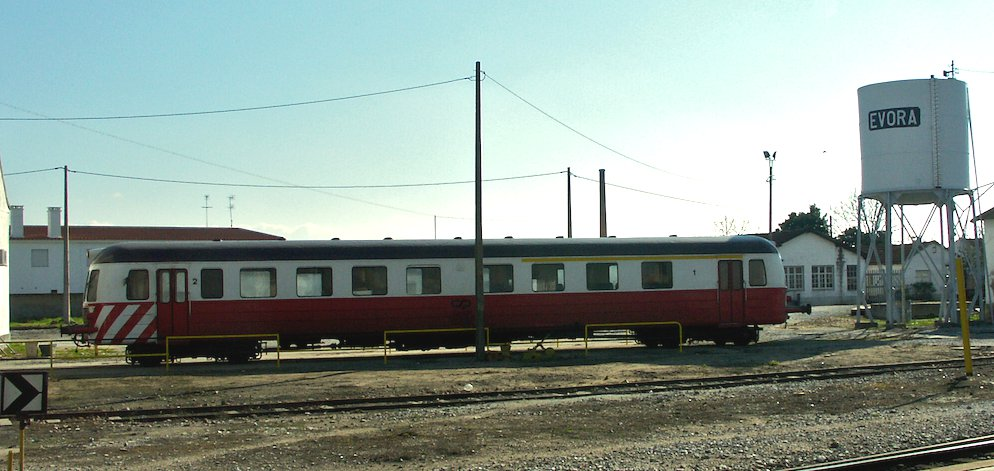 Automotora 0113 [Unidade Simples Diesel - Nohab] CP serie 0100 en la estação de Évora [Linha de Évora, PK 116]